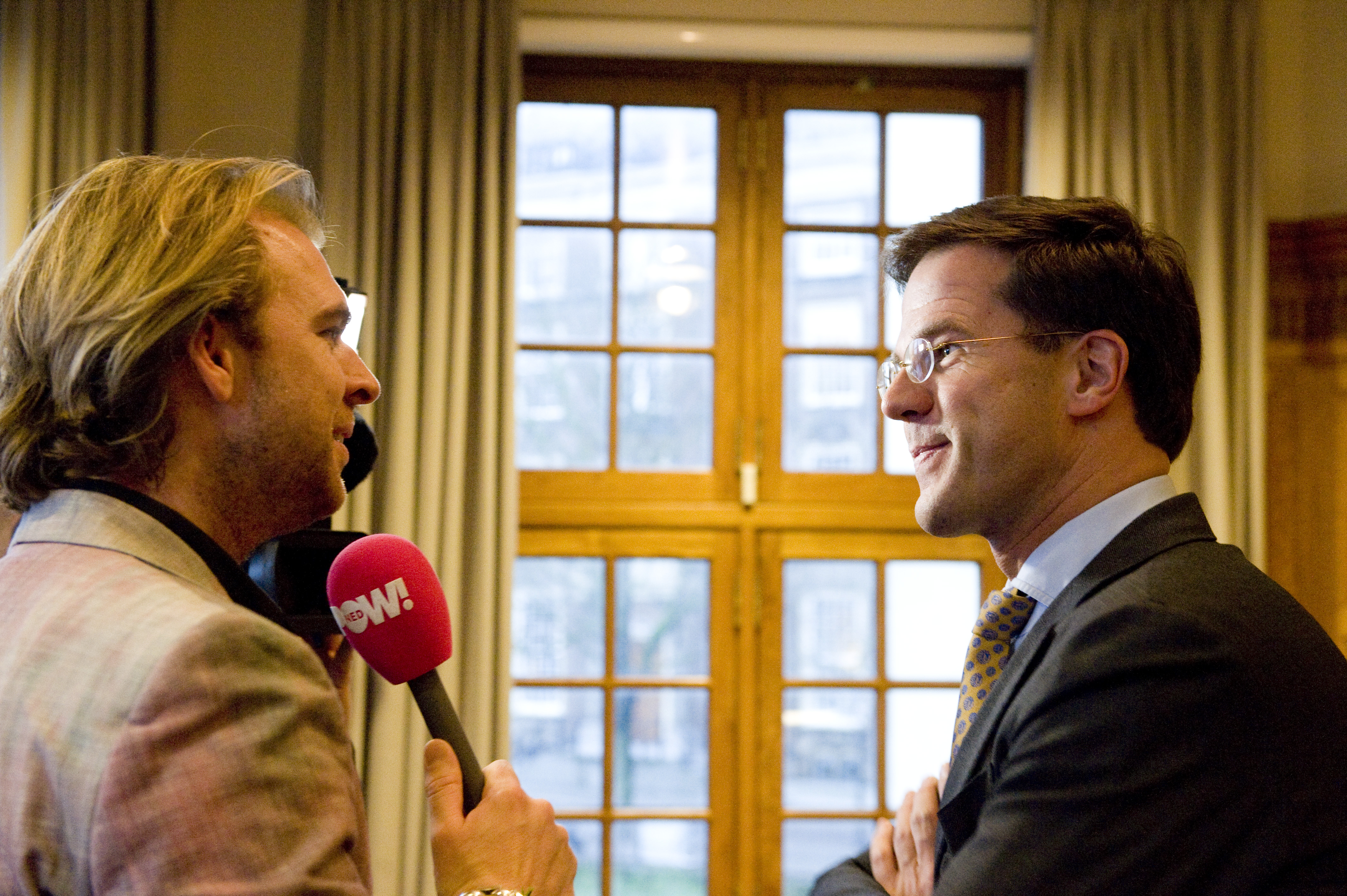 Opnames van Powned tijdens het bezoek van Rutger Castricum aan minister-president Rutte in het Torentje.